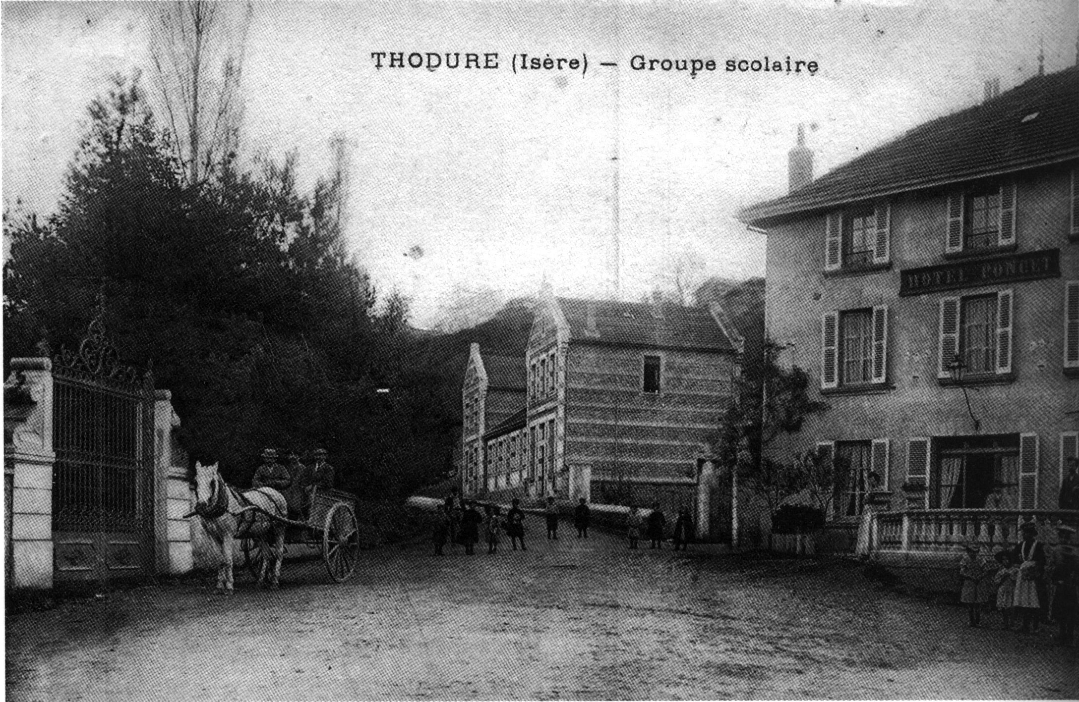 Thodure, groupe scolaire, en 1910